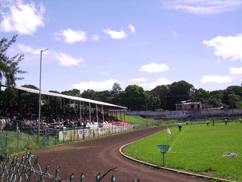 Unidad Deportiva San Andres Tuxtla